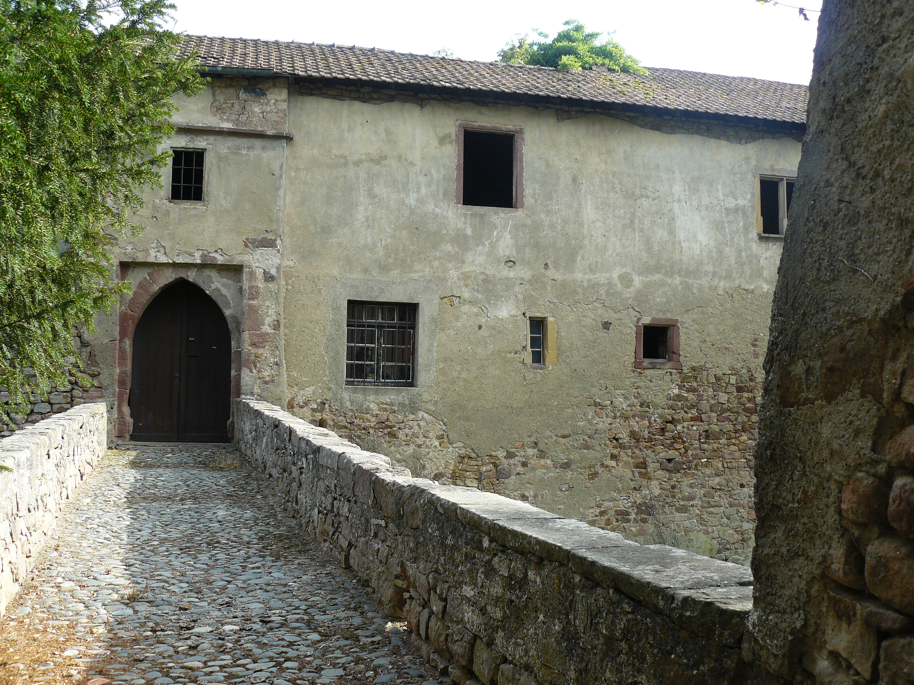 Reste du Château d'Orschwihr - Entrée du château